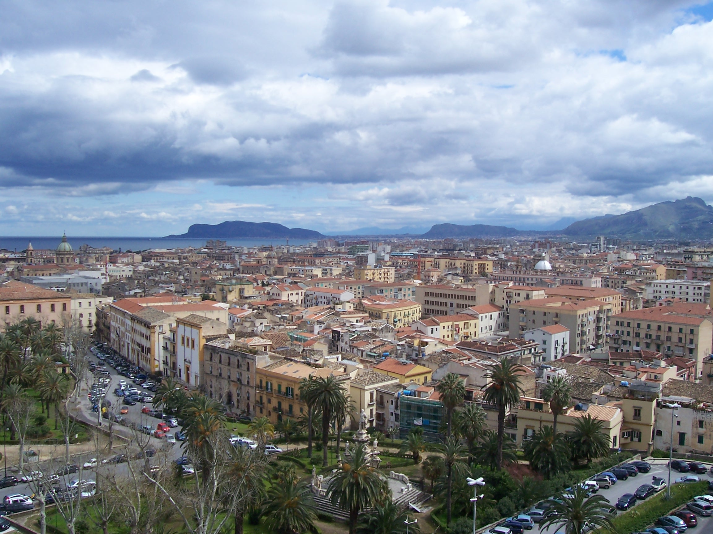 Vista Palermo dal Palazzo dei Normanni